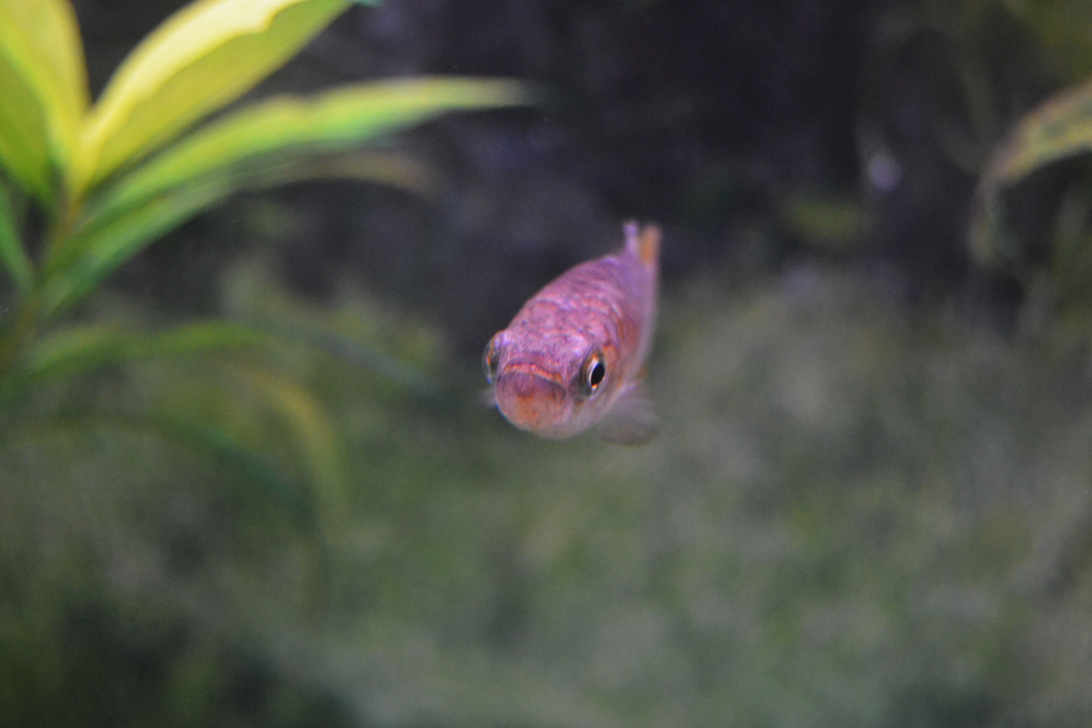 Samaruc a l'aula de la natura (alqueria de Fèlix), parc de Marxalenes, València.